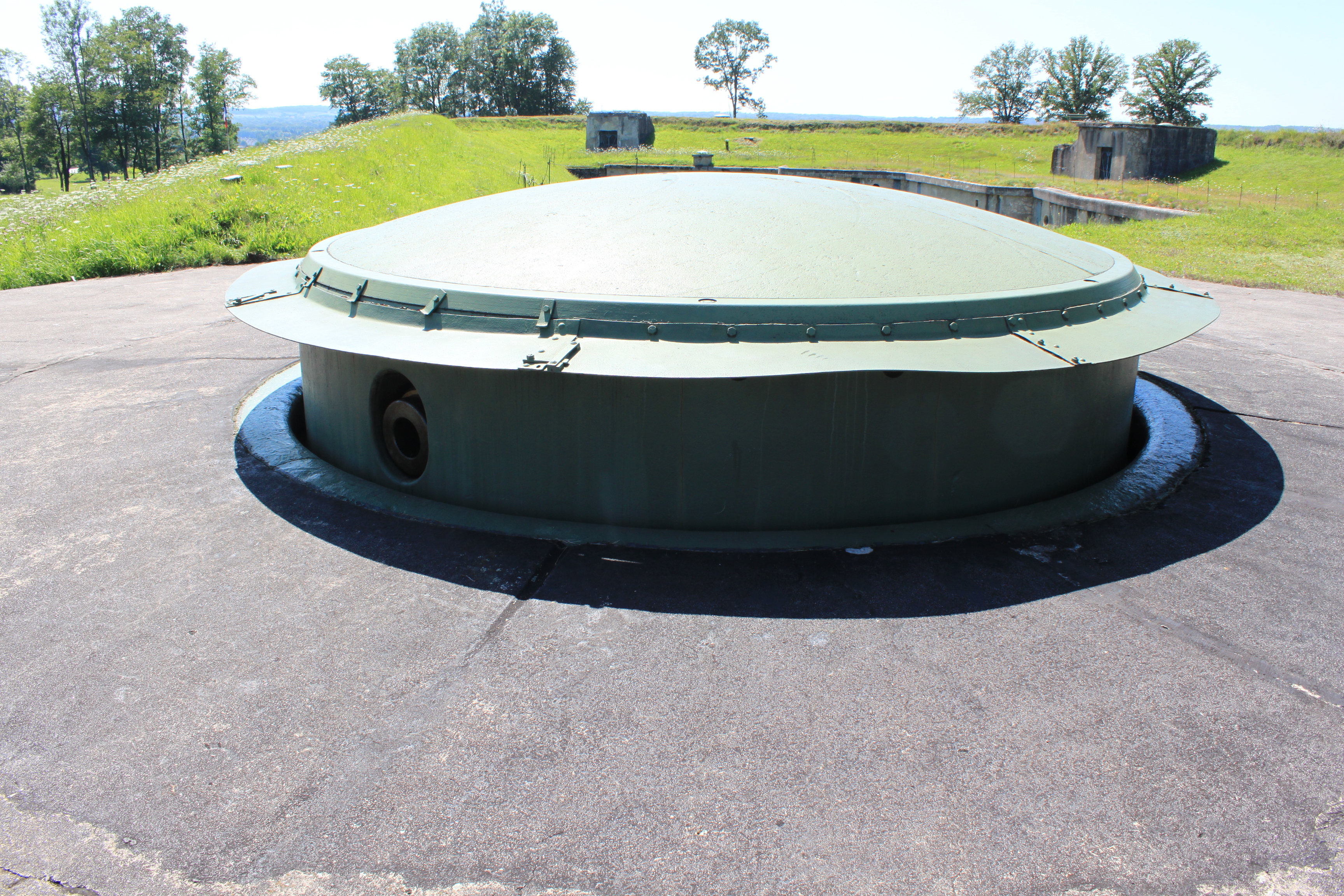 Fort d'Uxegney, Vosges, Lorraine, France